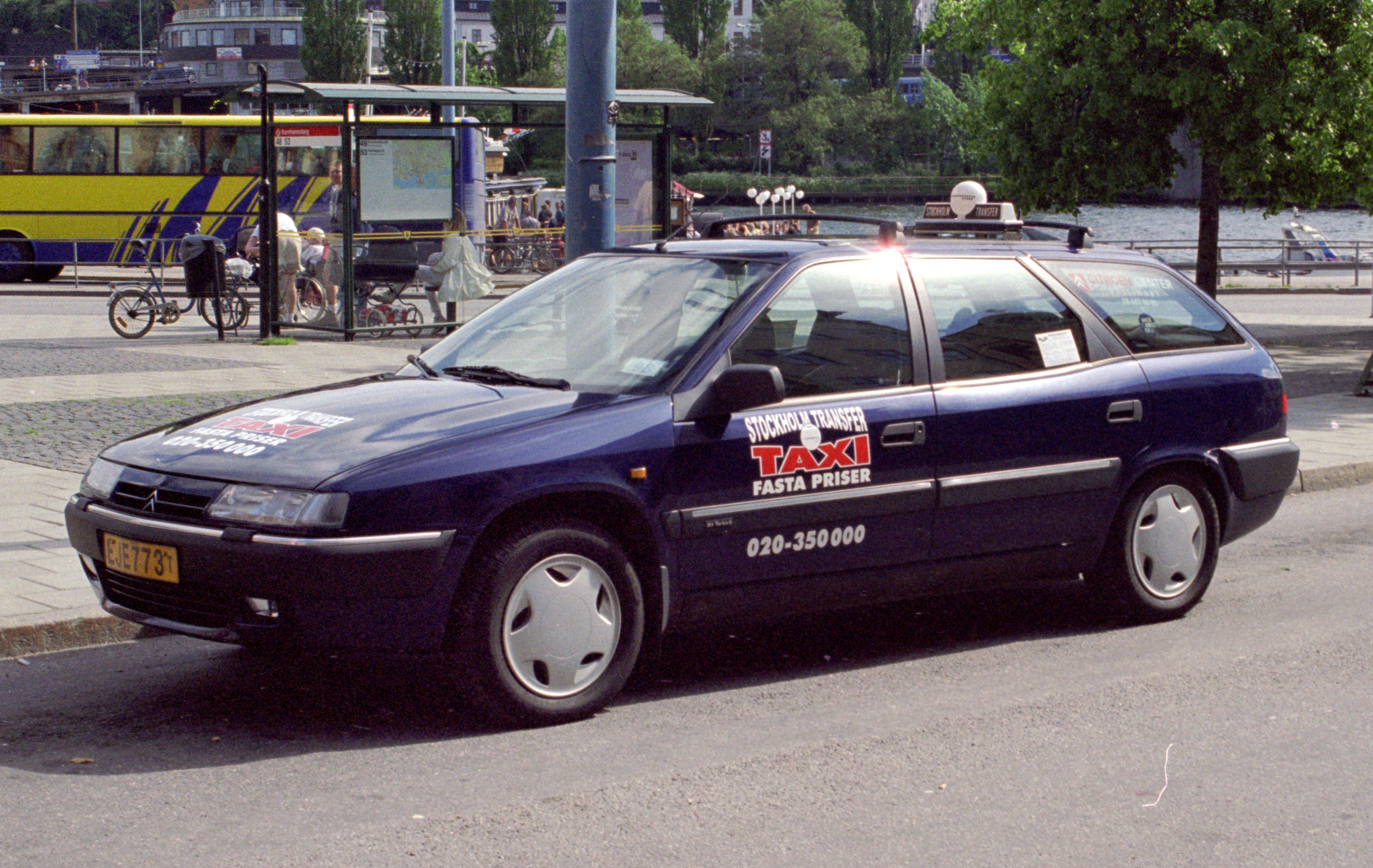 Citroën Xantia Break från Stockholm Transfer Taxi AB 1998